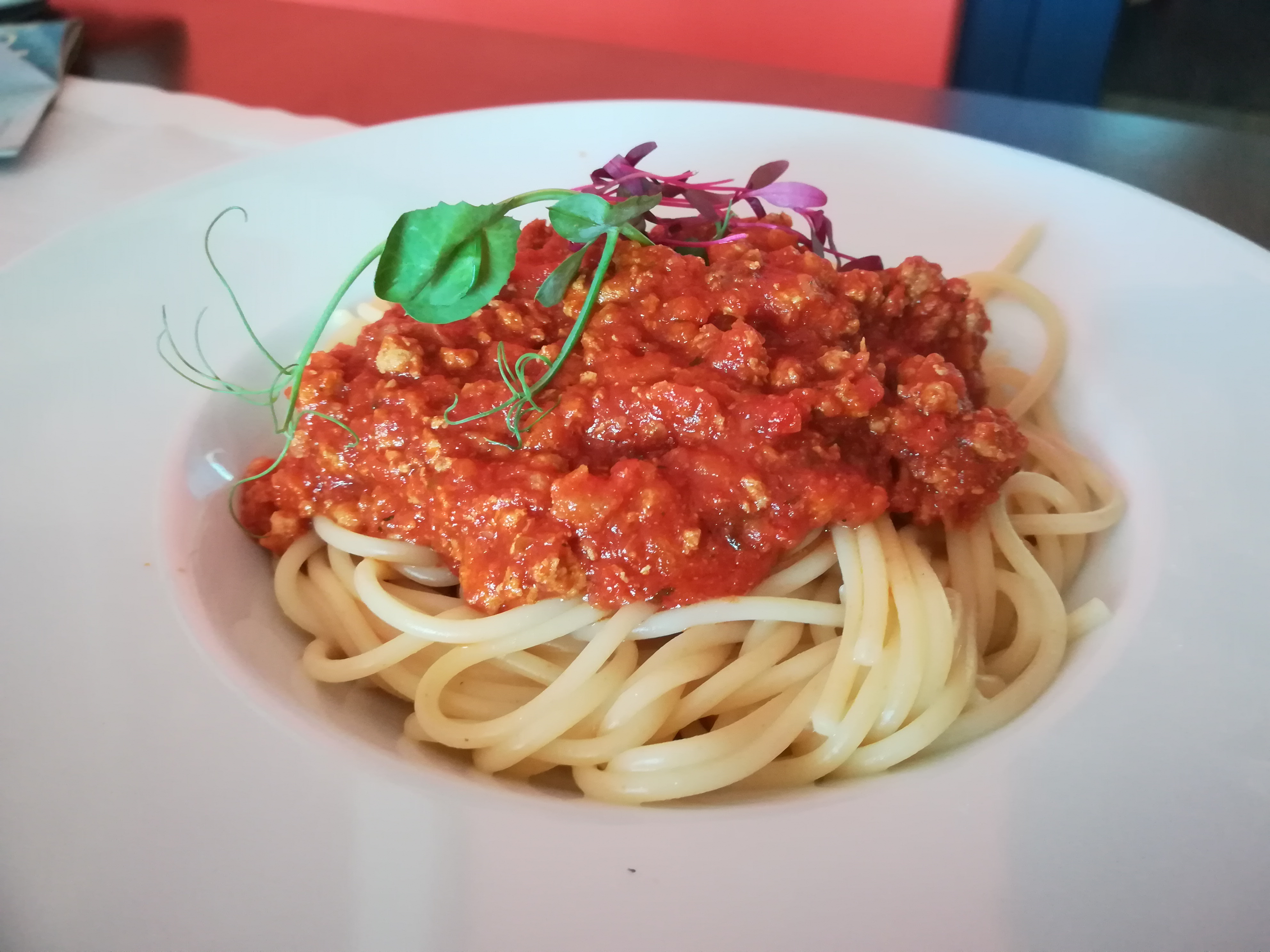 Jedzenie w Licheniu Starym. Spaghetti bolognese.